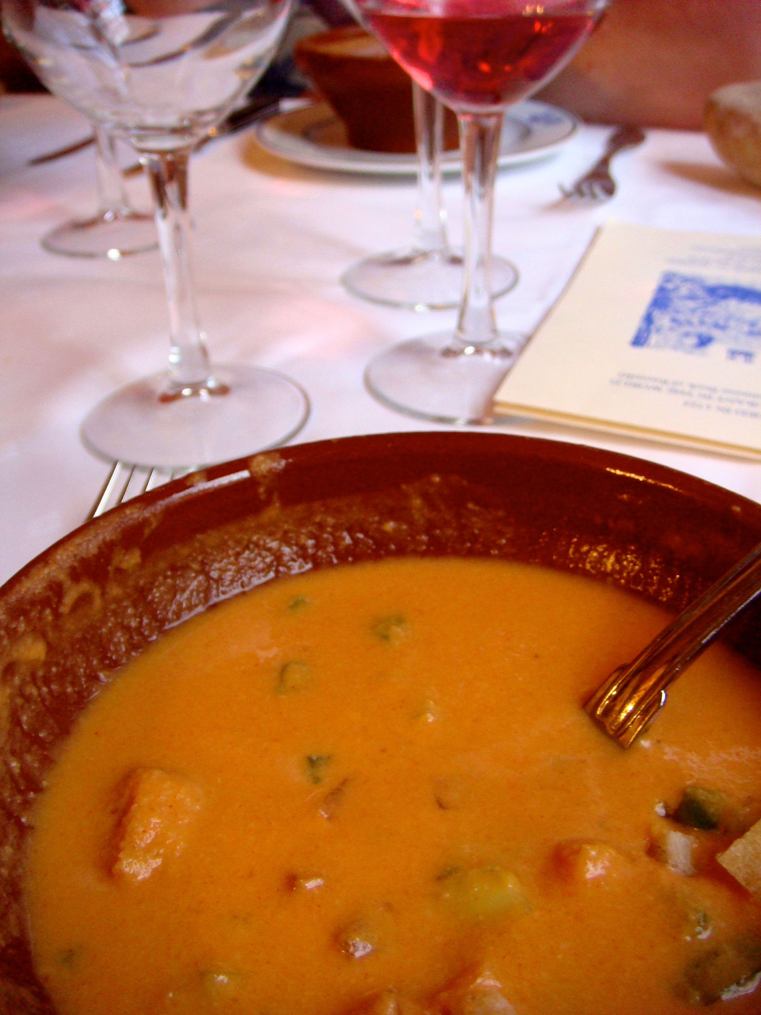 Gazpacho con tropezones